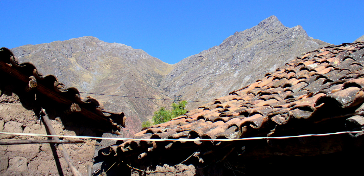 Apu urqu Sarhua